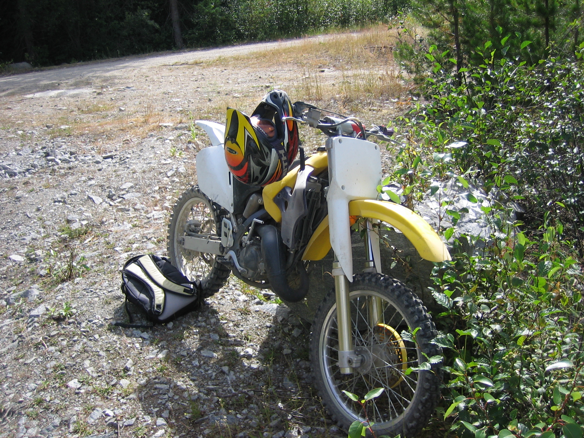 Suzuki RM125V